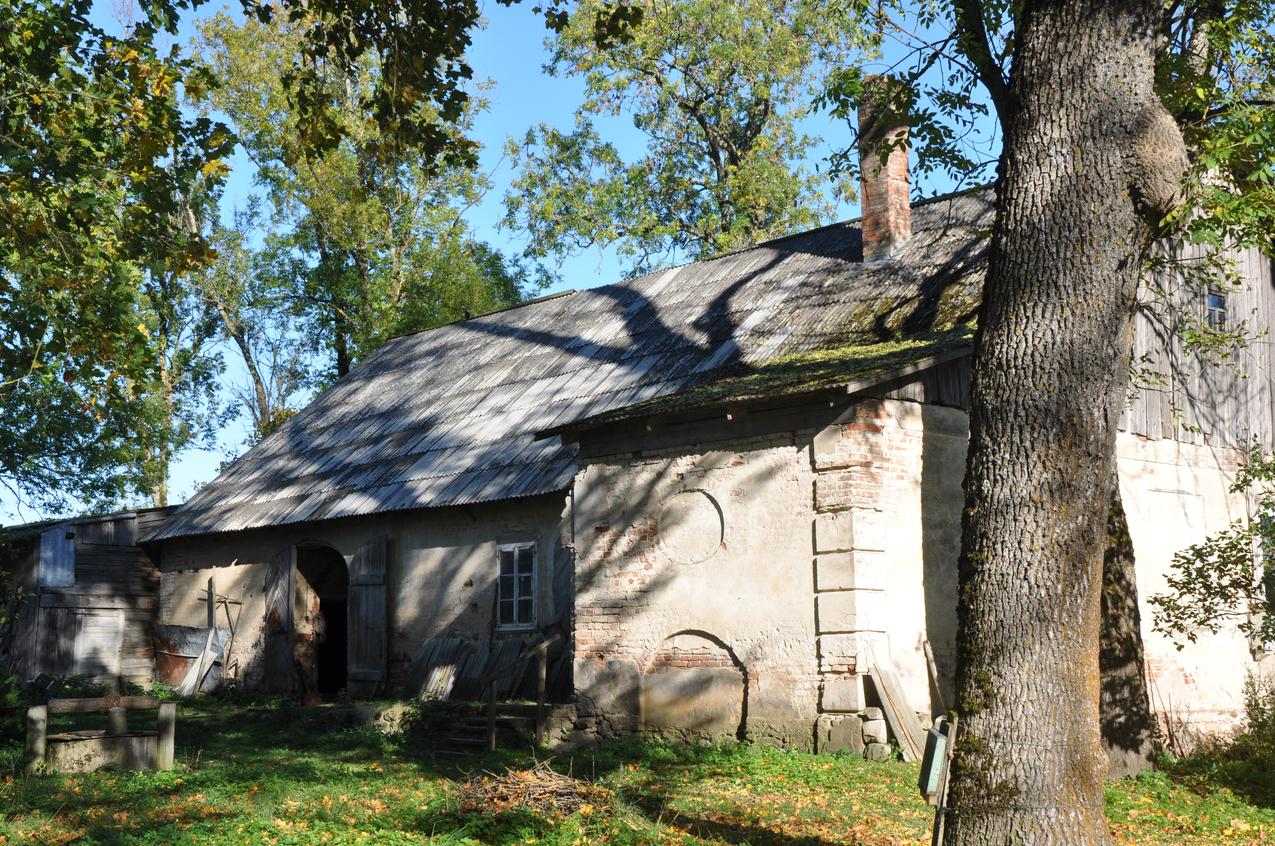 Kastrānes pusmuižas saimniecības ēka